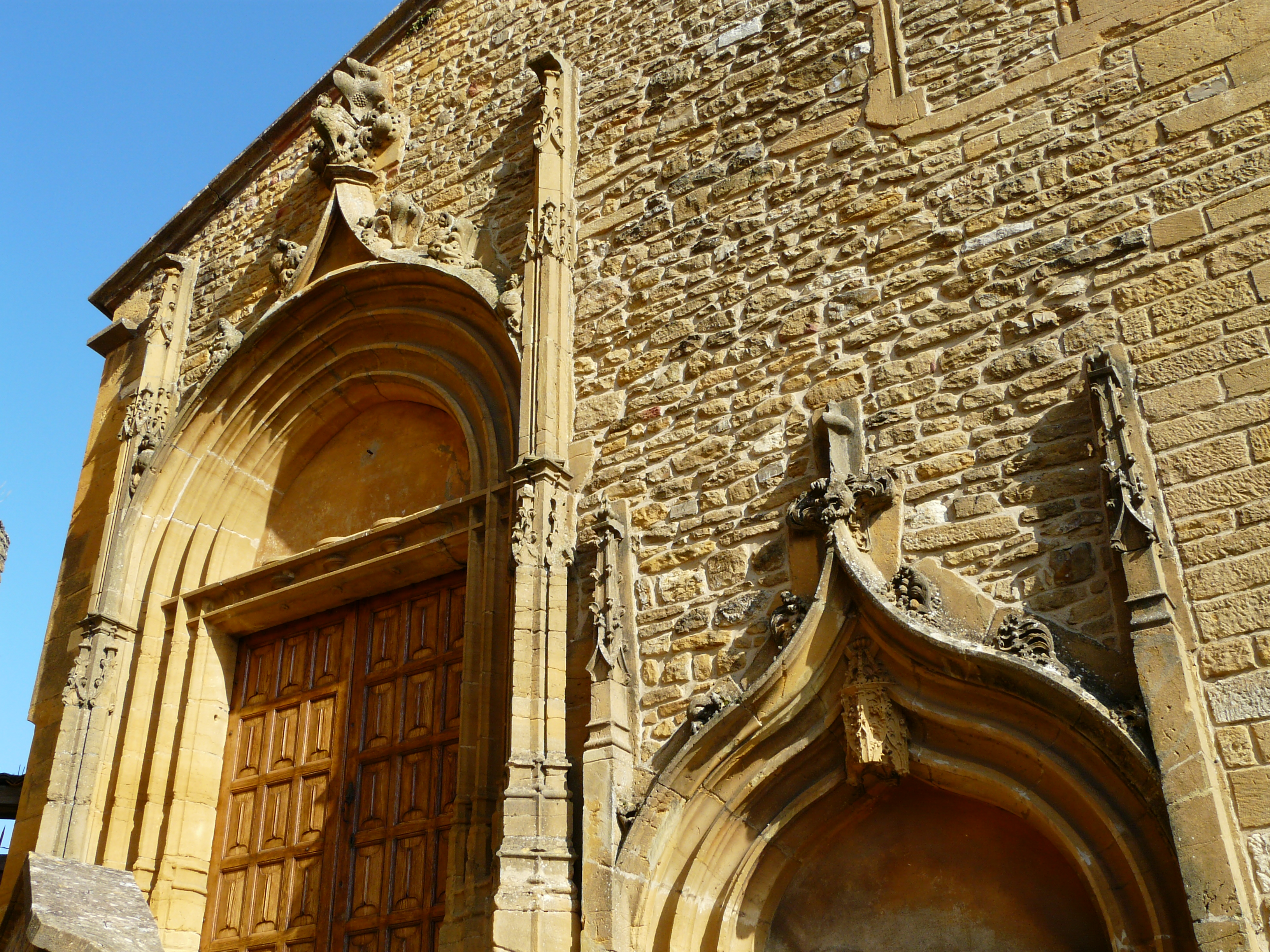 Portails gothique flamboyant de la chapelle de Châtillon-d'Azergues